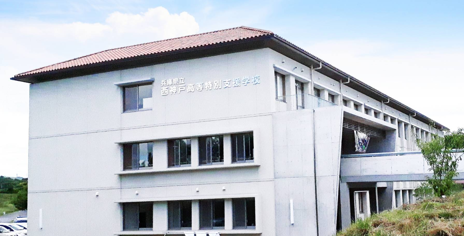 兵庫県神戸市にある特別支援学校